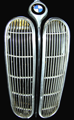 Kühlergrill BMW 501 fotografiert 2004 im Automobilmuseum Fichtelberg Fotograf: Walter J. Pilsak, Waldsassen